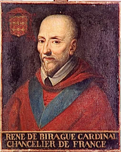 commandé par l'abbé de Pomponne et le marquis de Breteuil pour le couvent des grands augustins à Paris en 1733